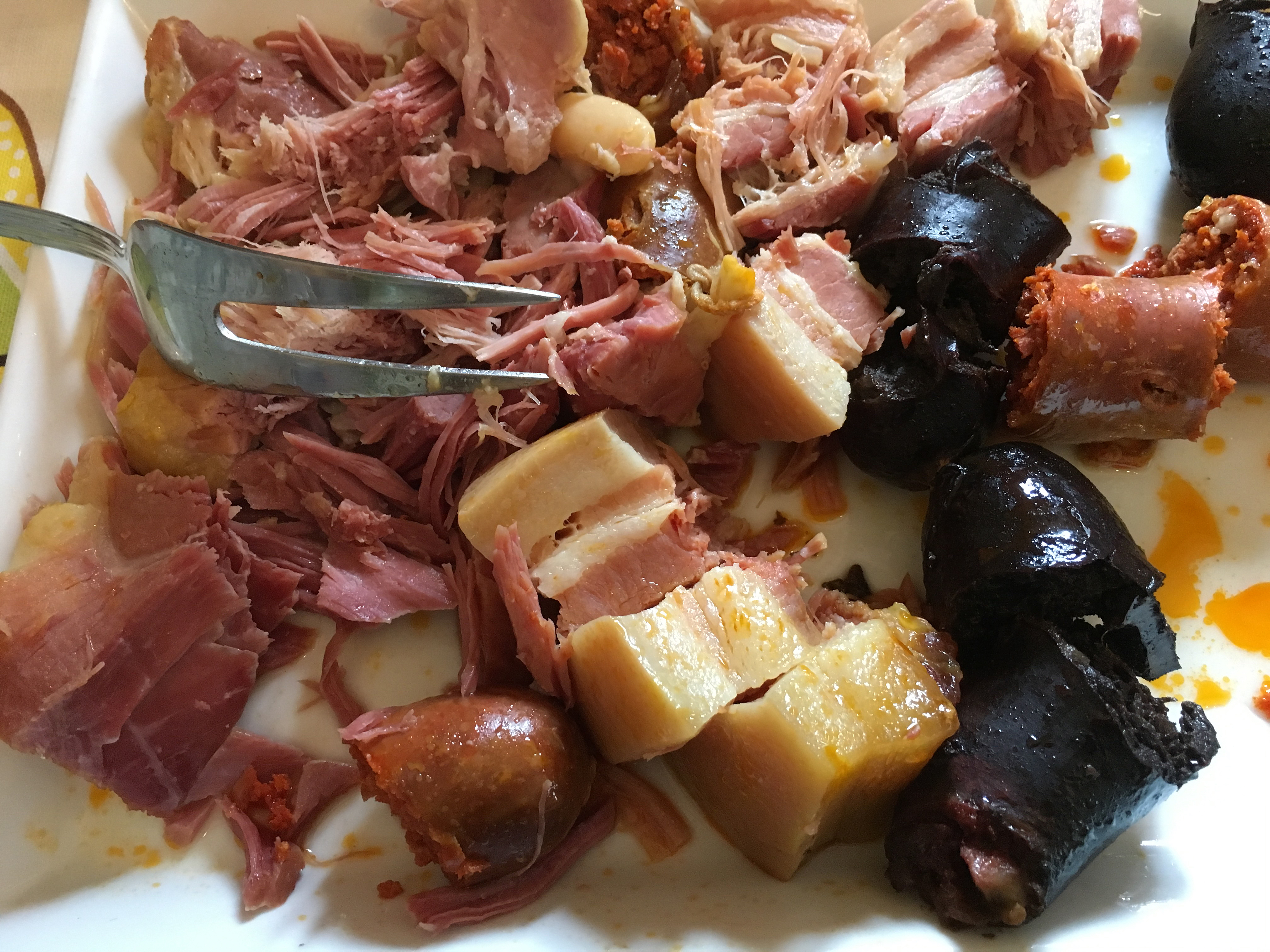 Compangu llistu pa comer con la fabada